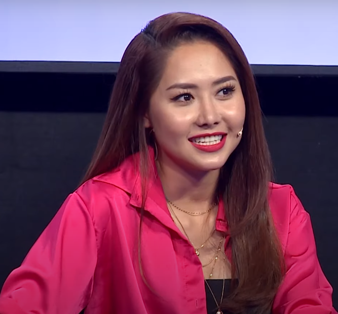 Tường Vi, ảnh chụp màn hình từ video của BEE Entertainment/Giải Trí (screen capture from video of BEE Entertainment/Giải Trí).